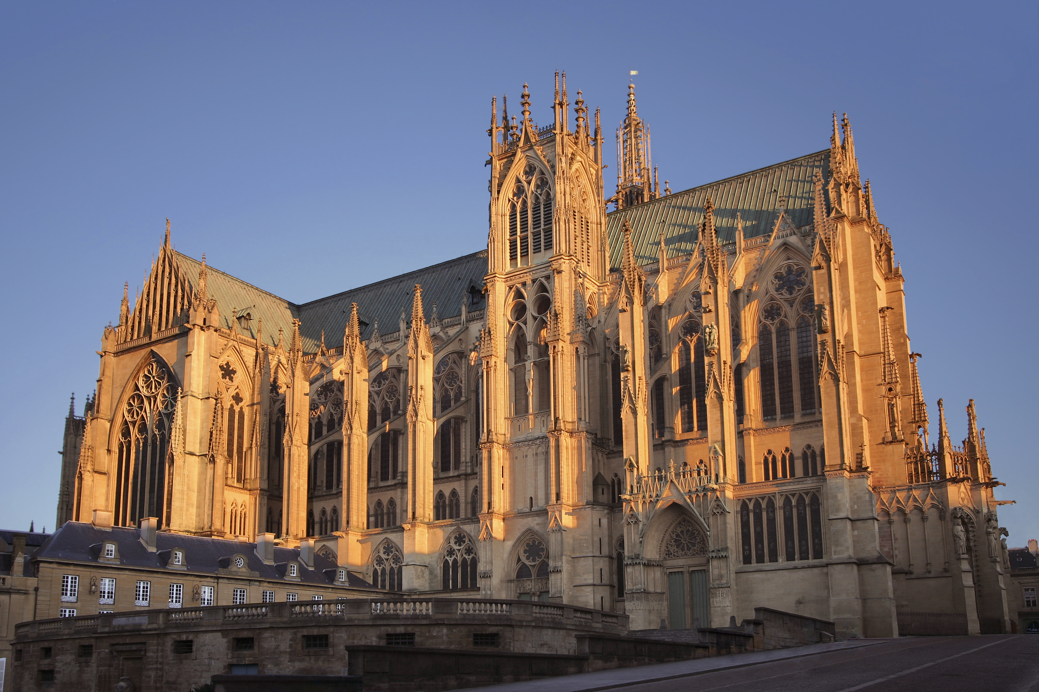 Cathédrale Saint Etienne de Metz (Hiver fin d’après midi)